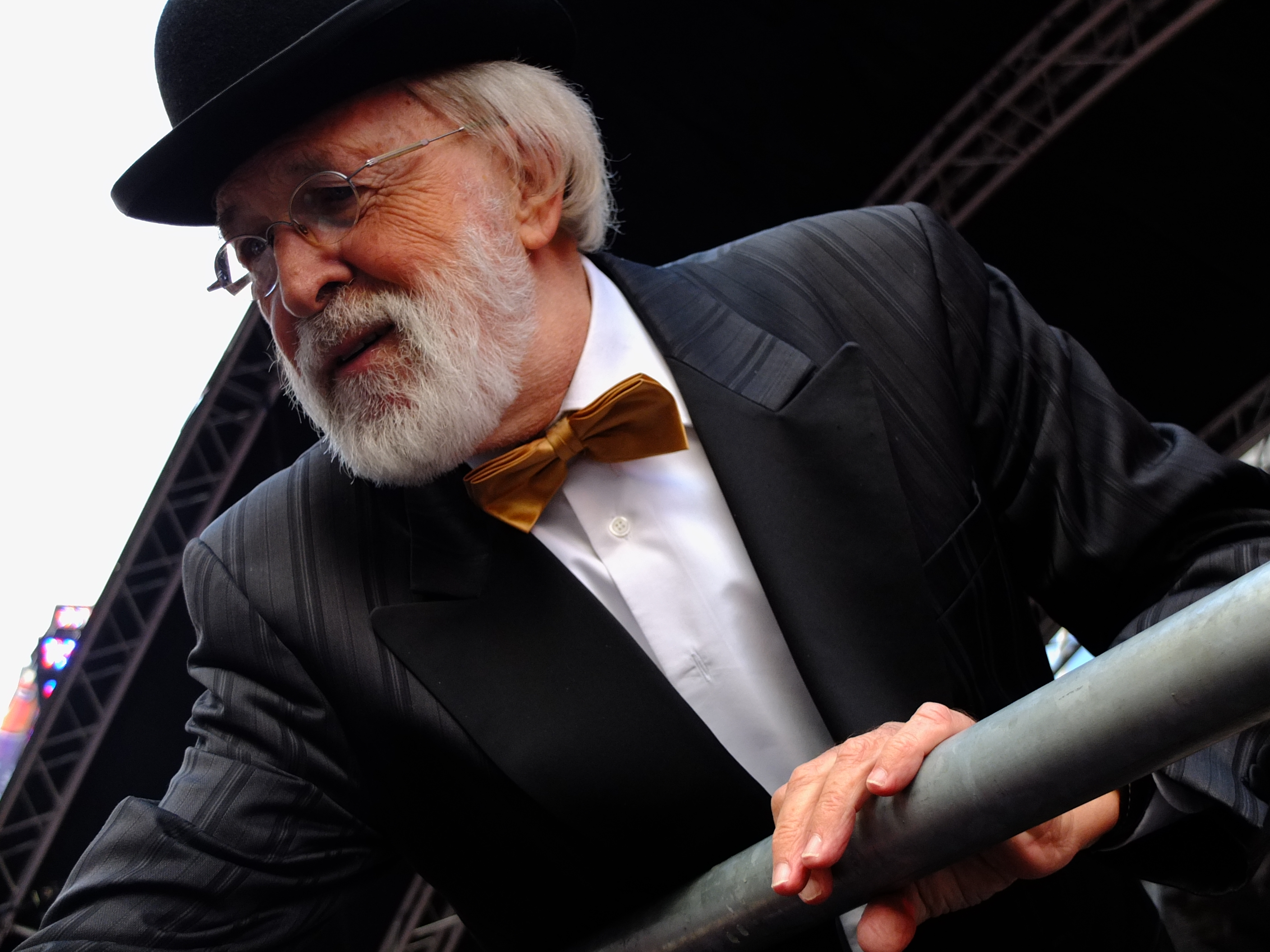 Optreden vader Abraham Grote Markt Breda